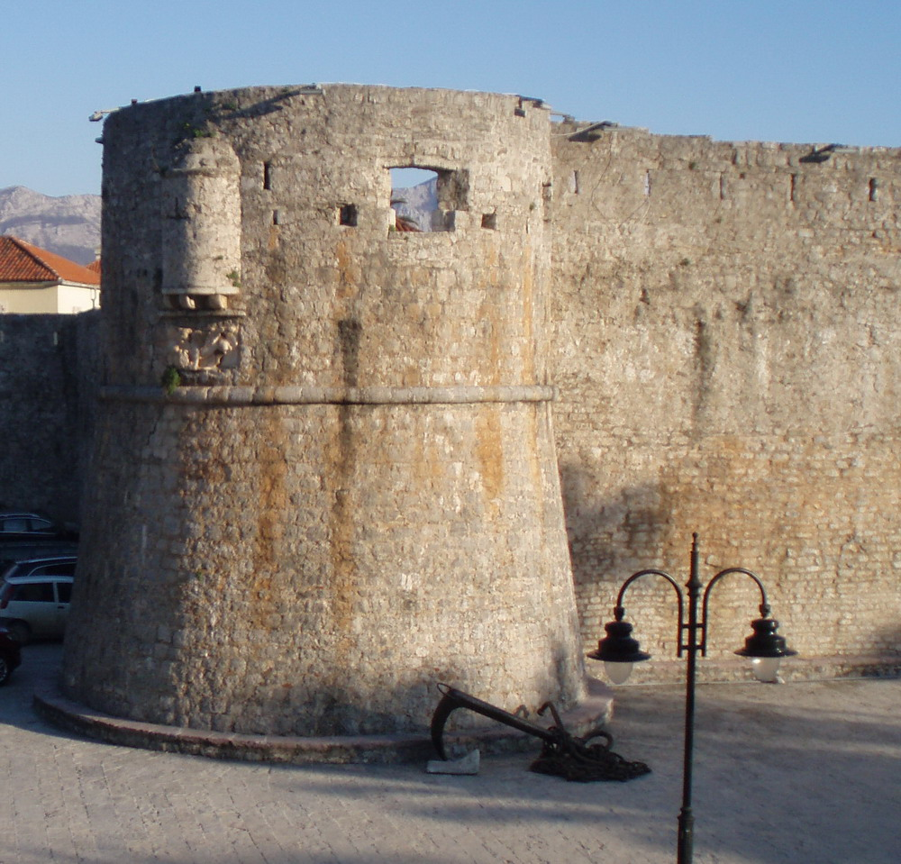 Kula u Budvi